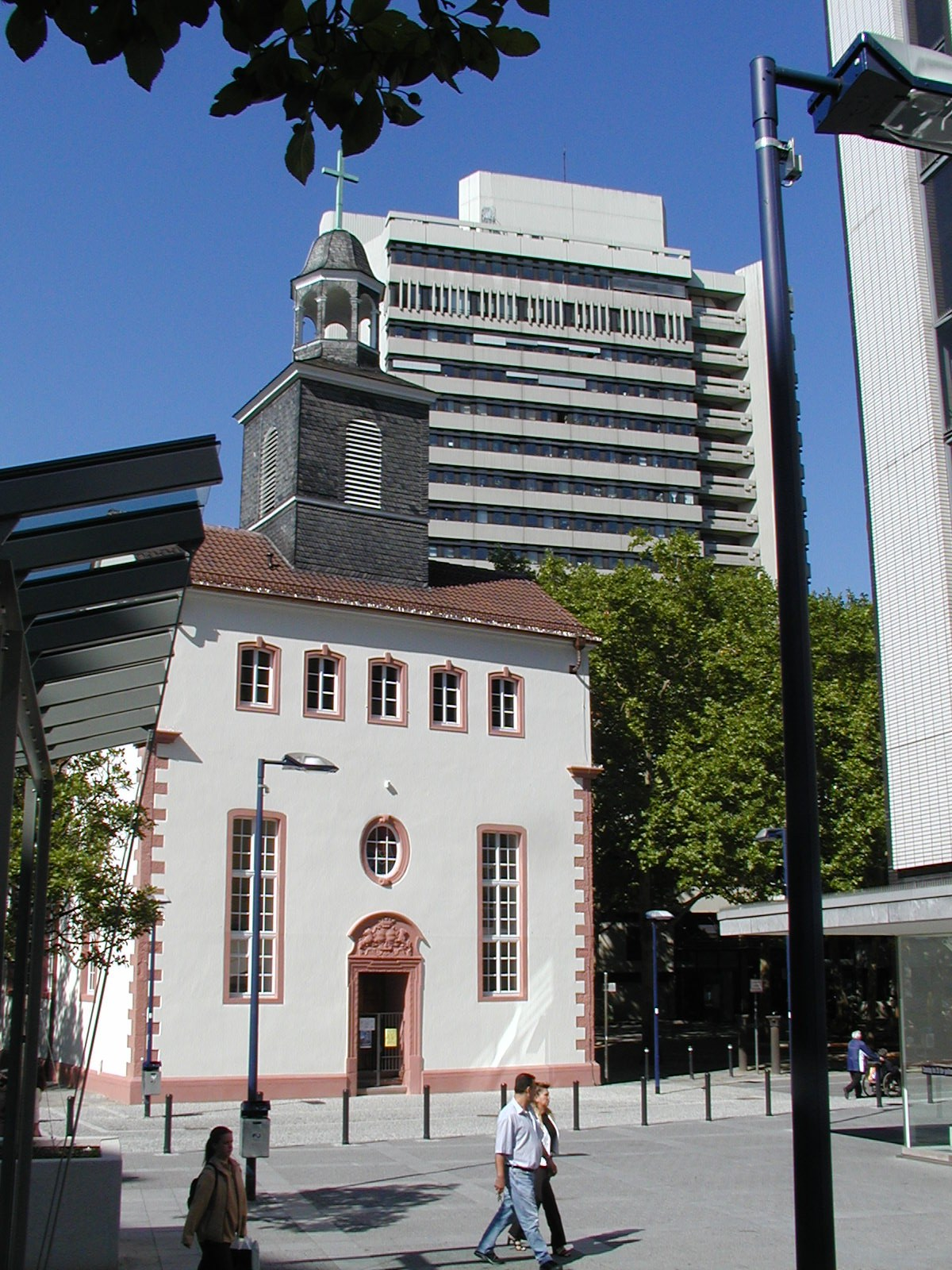 Die evangelische Stadtkirche in Offenbach, Herrnstraße.